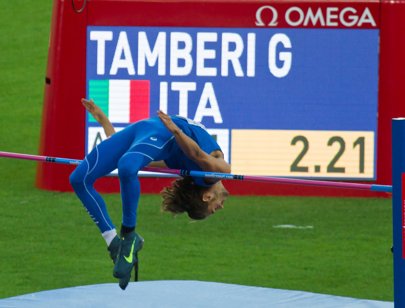 99138 tamberi